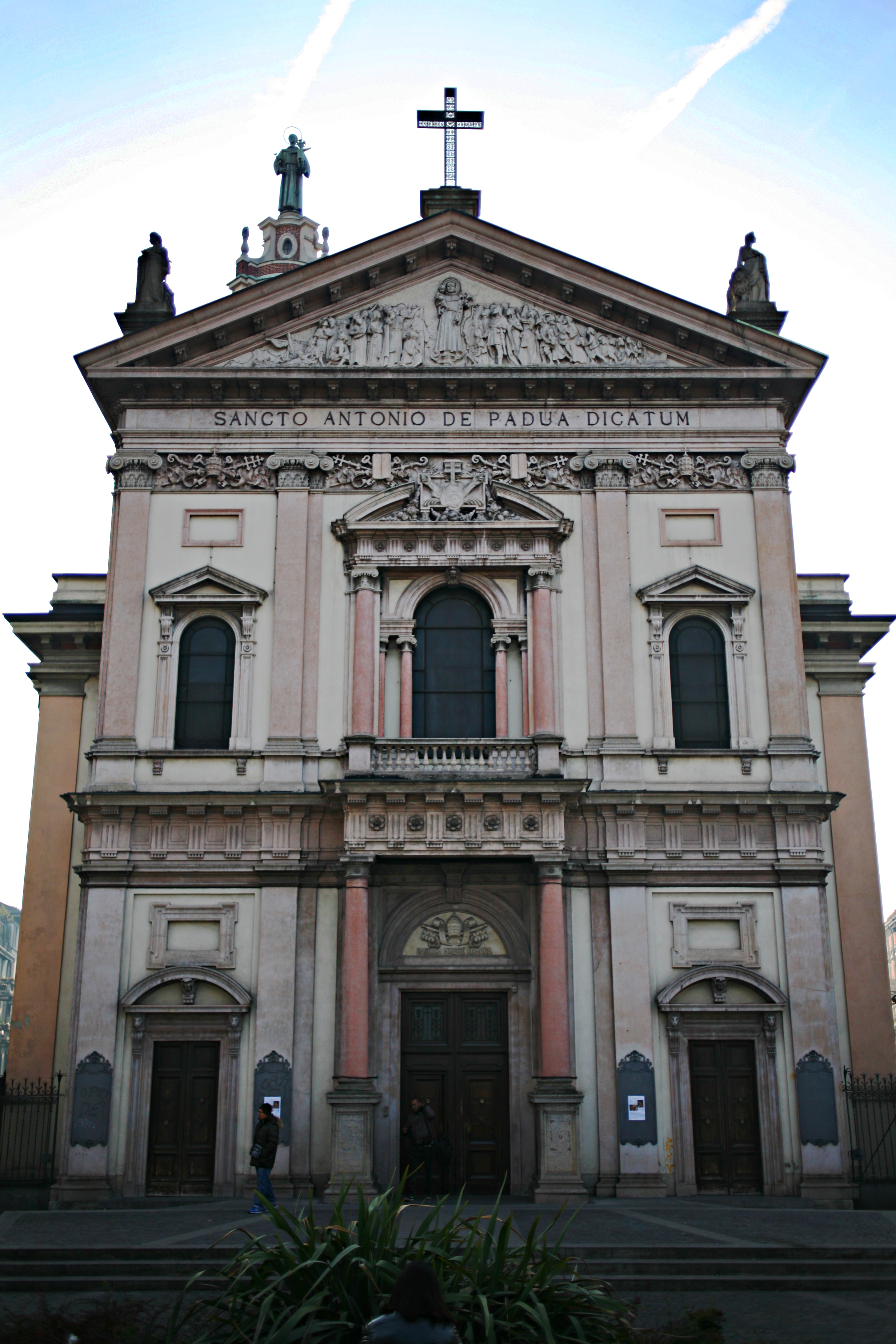 Facciata del Santuario di Sant'Antonio da Padova, Milano